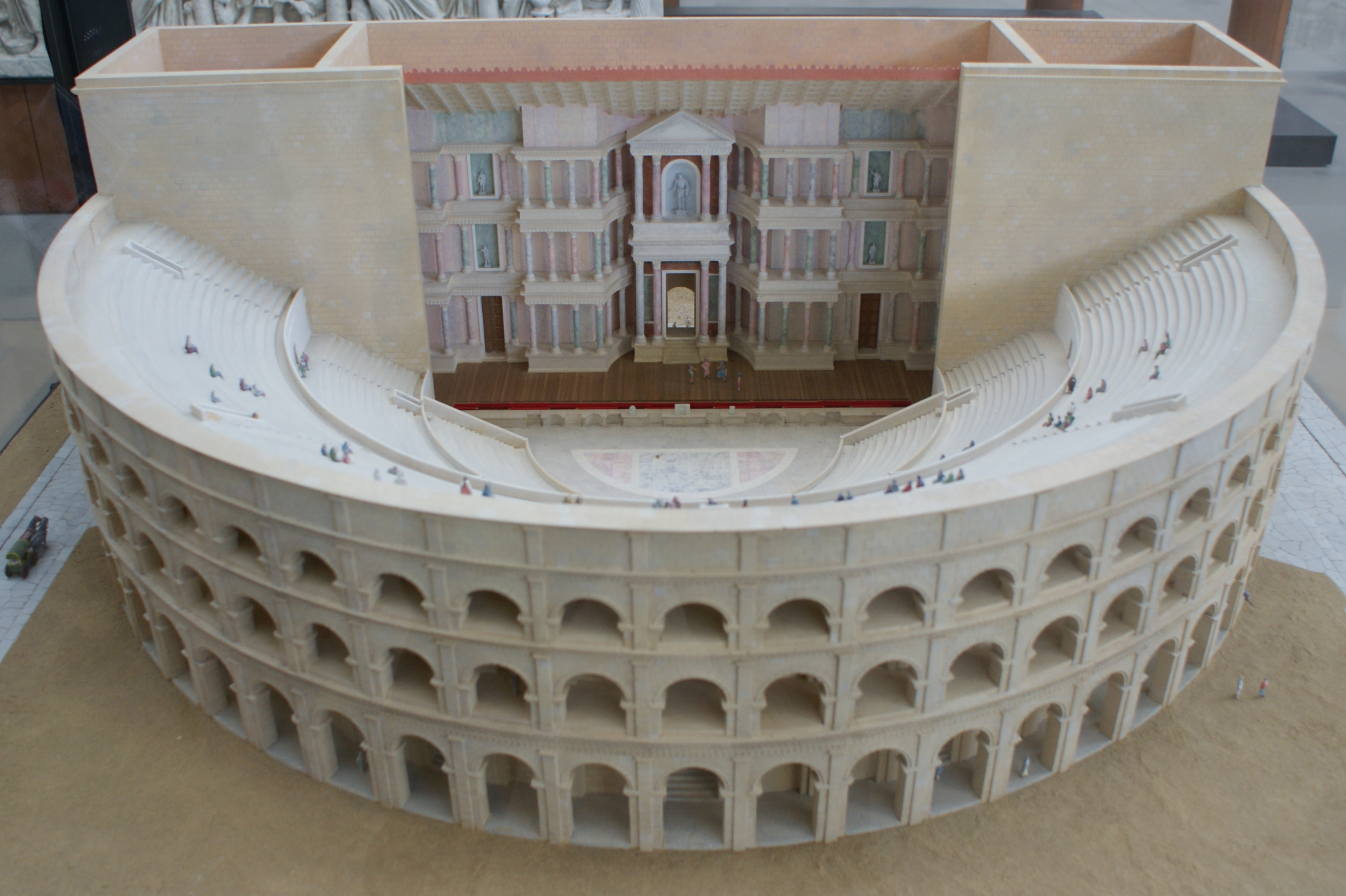 Maquette représentant ce qu'a pu être le théâtre d'Arles à l'époque Augustéenne, réalisée au 1/100e, conçue par M. Fincker (CNRS), réalisée par Maquettes Patrice Berger et visible au Musée de l'Arles Antique